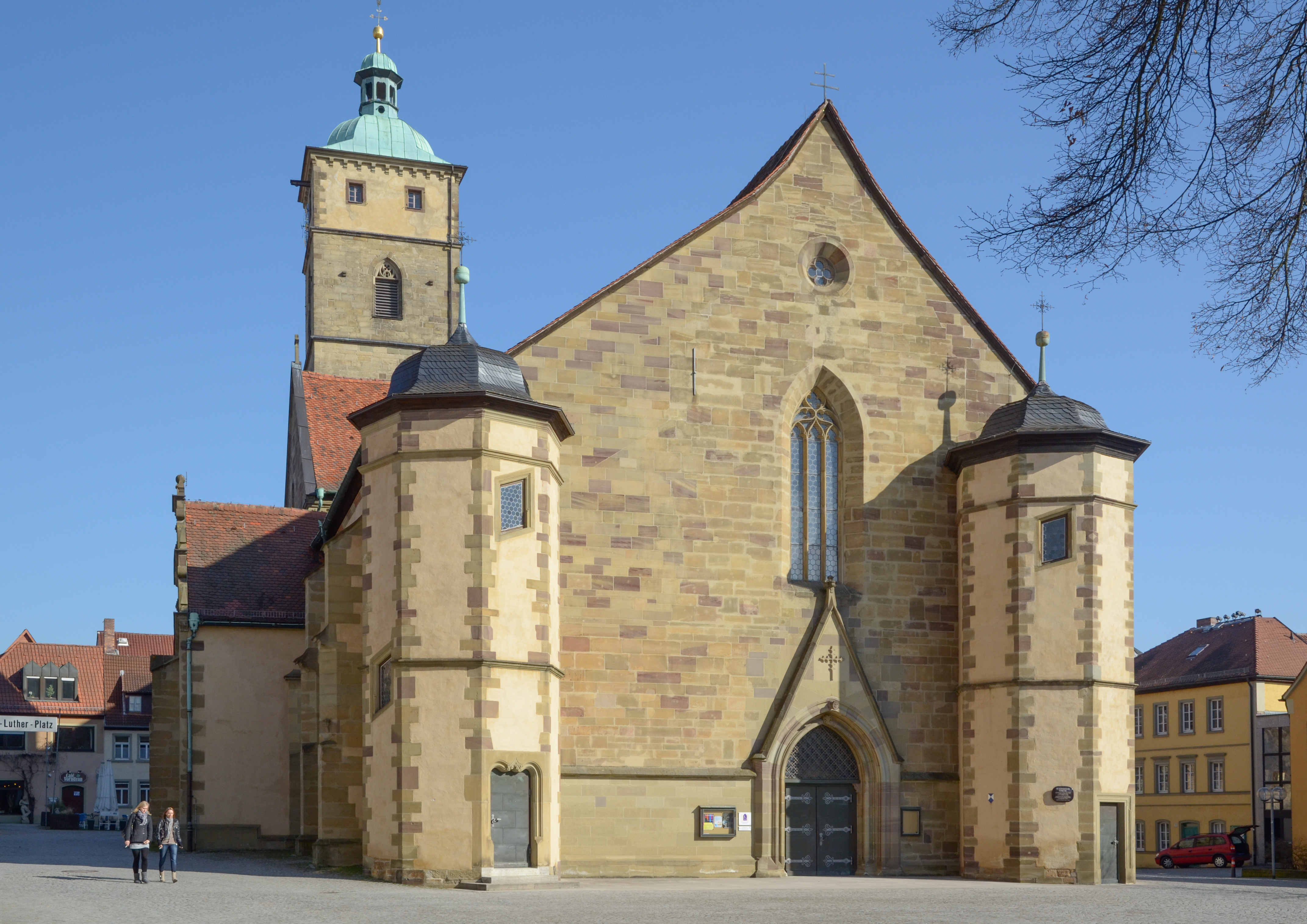 Evangelisch-Lutherische Stadtpfarrkirche St. Johannis in Schweinfurt